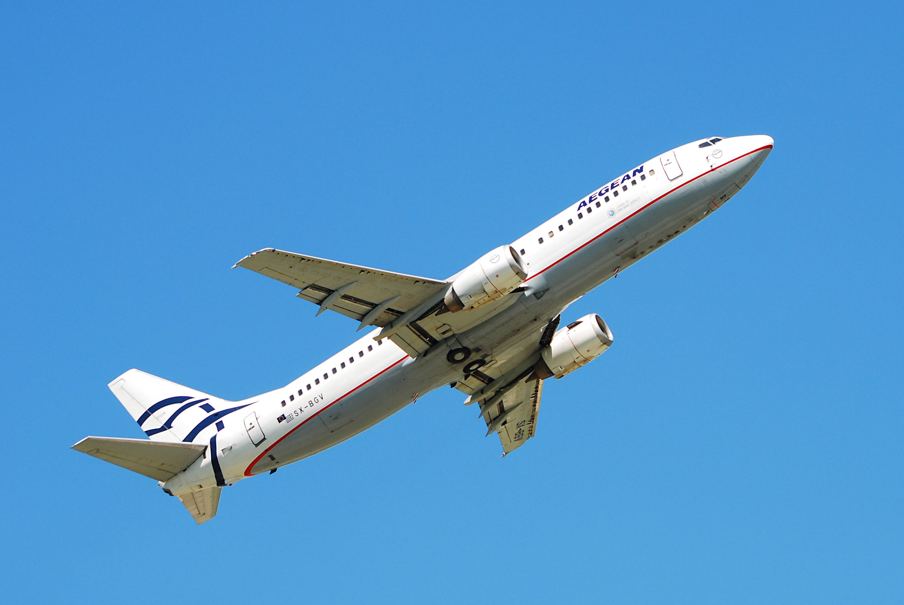 Aegean Airlines (SX-BGV), Boeing 737-400 Spotting in June. Stuttgart Airport (STR / EDDS)